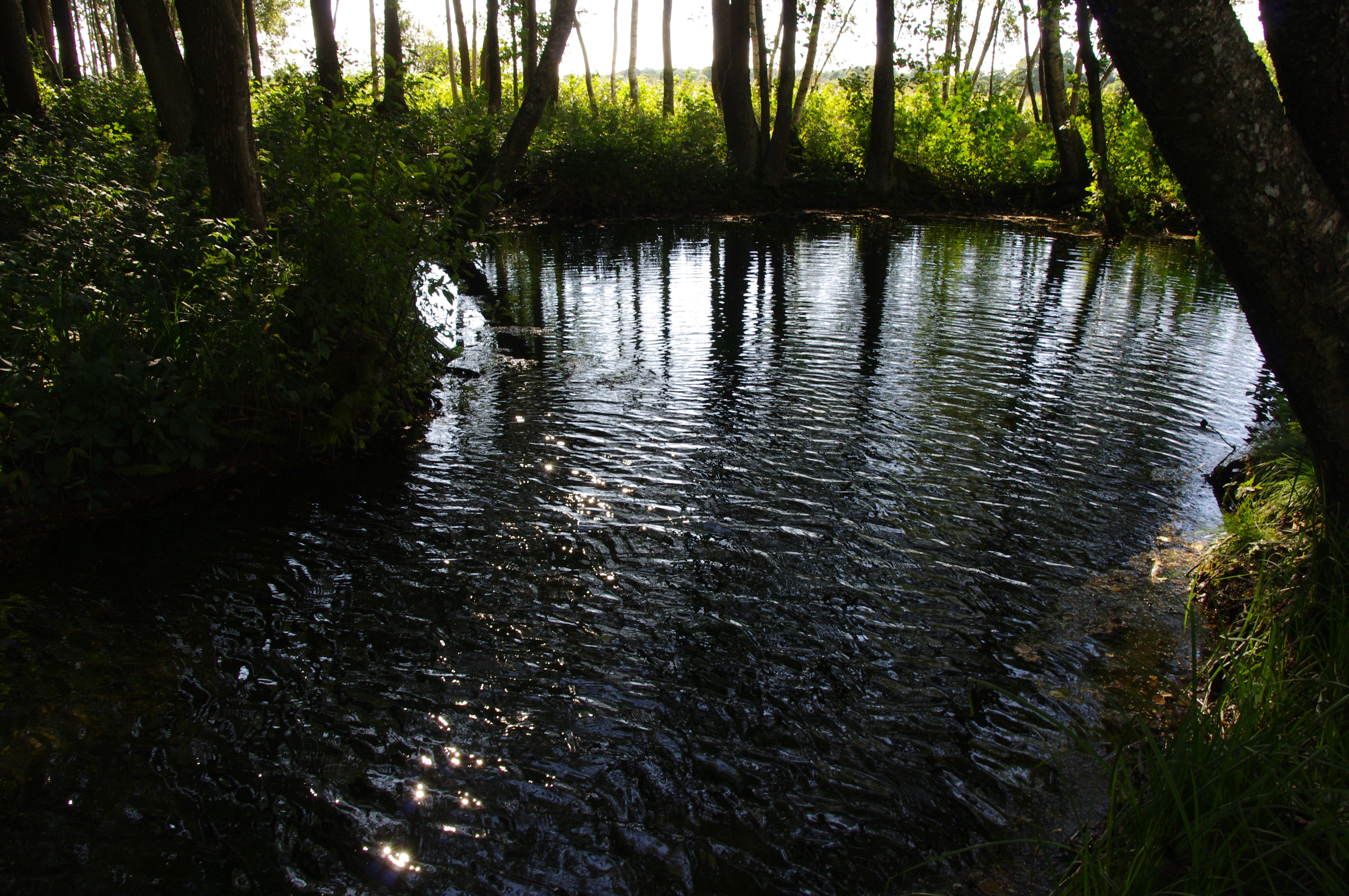 Põhjatu allikas